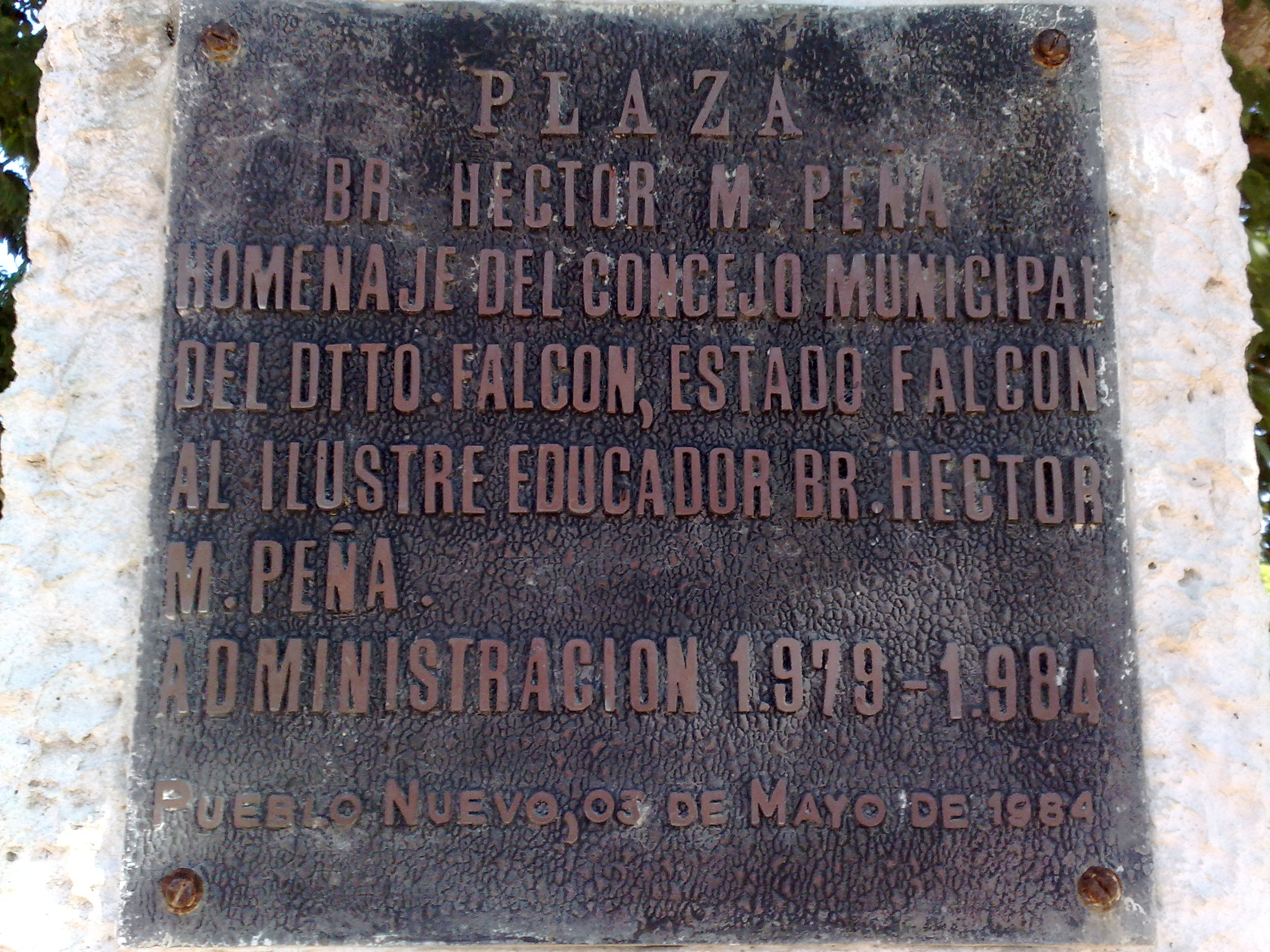 Placa del Bachiller Héctor M. Peña en la plaza homónima de Pueblo Nuevo, Estado Falcón.